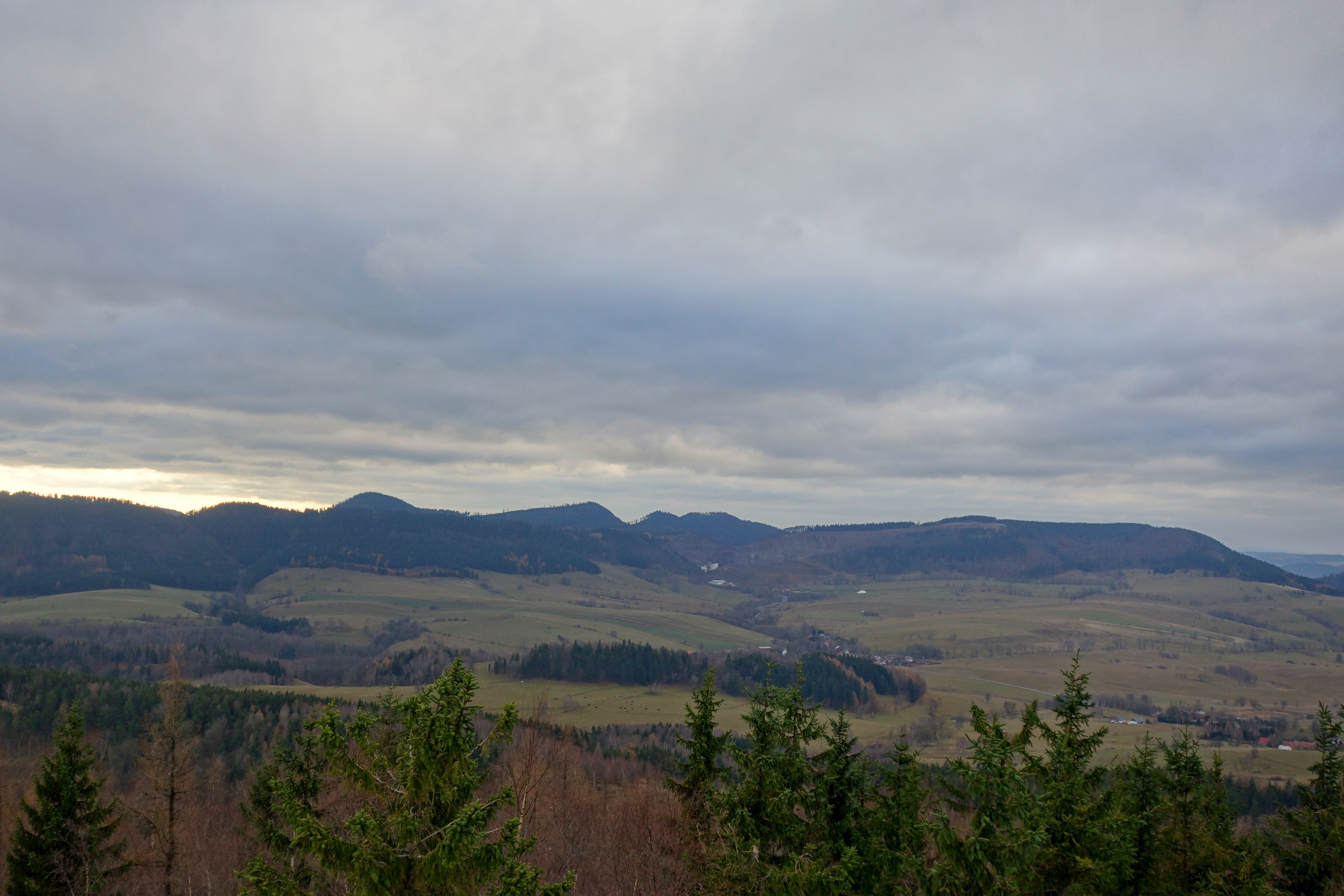 Góry Suche z hory Borowa